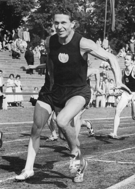 Zentralbild Wlocka 24.7.1956 DDR-Leichtathletik-Meisterschaften in Erfurt. In der Zeit vom 20. bis zum 22. Juli 1956 wurden im Erfurter Georgi-Dimitroff-Stadion die VII. Leichtathletik-Meisterschaften der DDR ausgetragen. UBz: In der 4 x 100-m-Staffel der Herren siegte der SC Wissenschaft Halle mit einer Zeit von 41,4 Sek. Stabwechsel zwischen Manfred Steinbach (links, vedeckt) und Walter Meier.